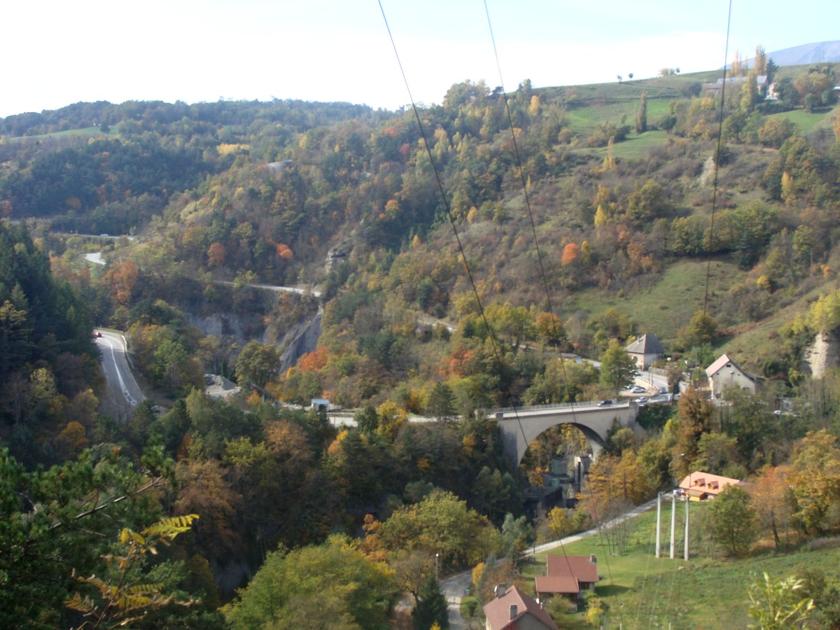 Le "Pont-Haut" sur la Bonne, au pied de La Mure d'Isère, un des points noirs de la route Napoléon.